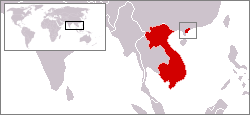 Ancien territoire français de Chine sur la côte est de la presqu'île de Leizhou